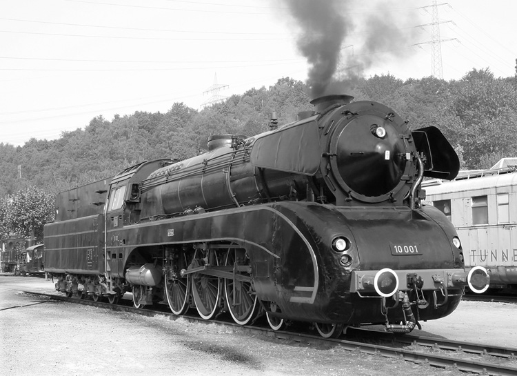 DB-Dampflok Baureihe 10. Aufnahme im Eisenbahnmuseum Bochum-Dahlhausen